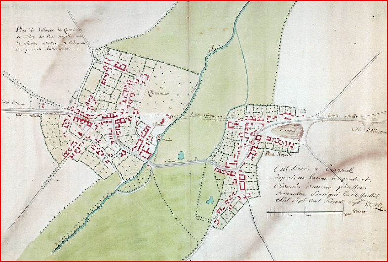 Plan des villages de Querrieu et de Pont-Noyelles établi en 1767. Il montre le détournement du chemin d'Amiens à Albert et celui du "Petit bras" de l'Hallue qui deviendra "La Sybirre" après son raccordement avec la source du même nom à Fréchencourt.